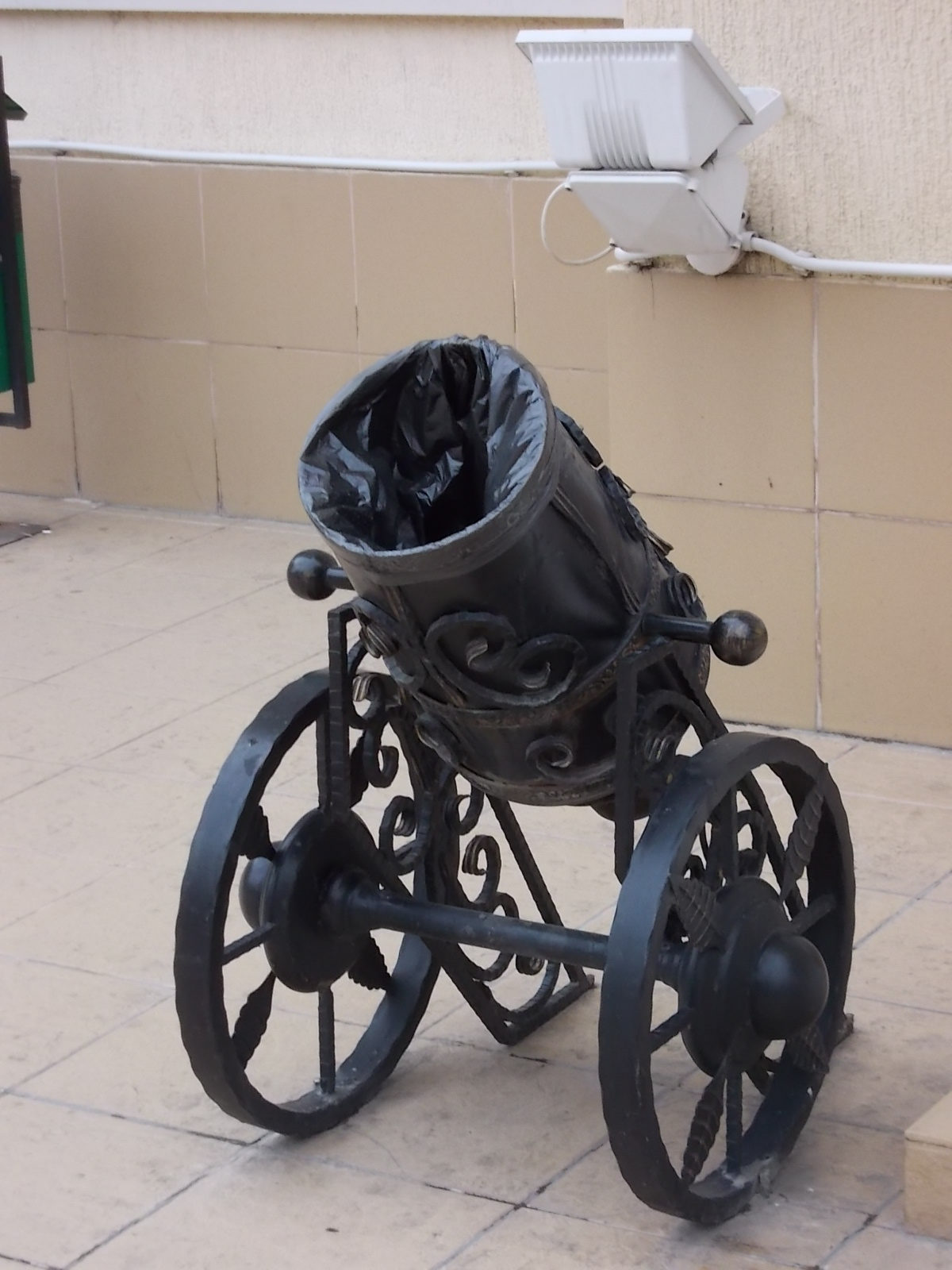 wheelie bin in Kislovodsk on the Spa Boulevard, Russia (урна на Курортном бульваре в Кисловодске, Россия)